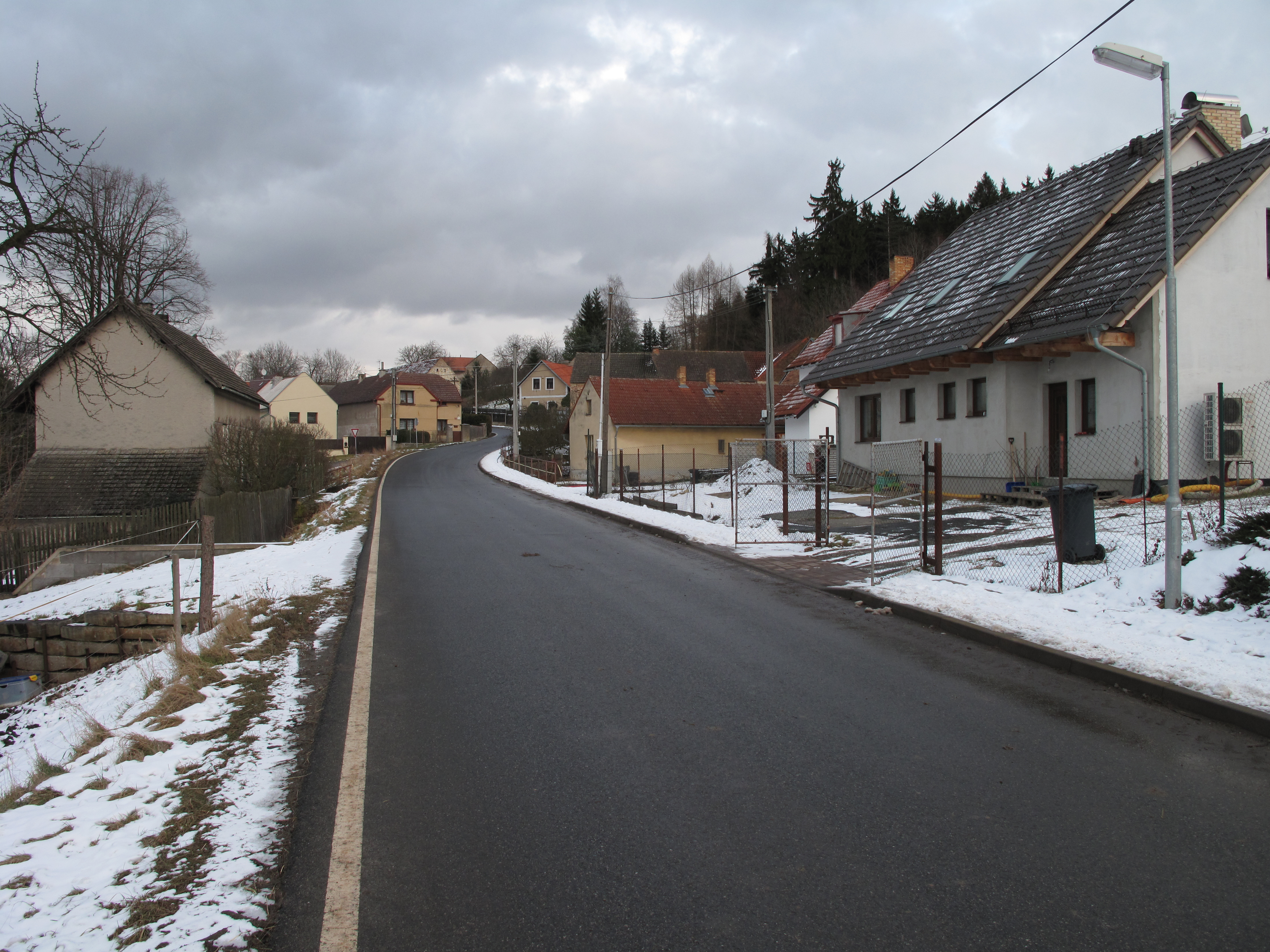 Silnice v Kalivodech. Okres Rakovník, Česká republika.